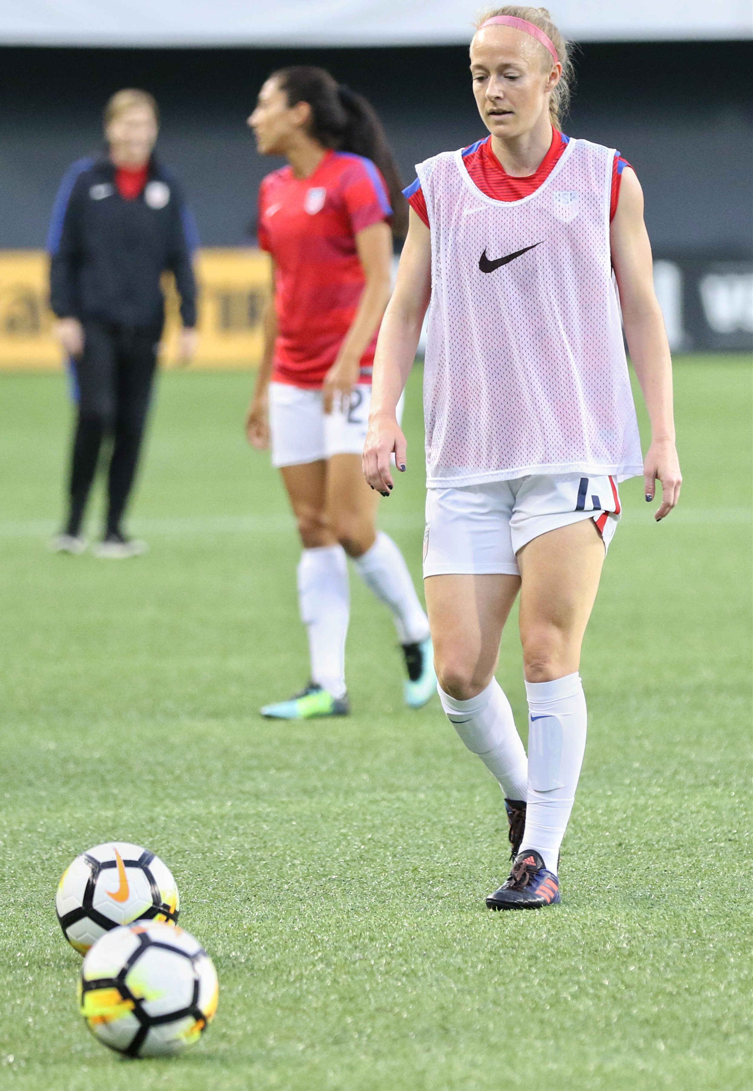 BeckySauerbrunn